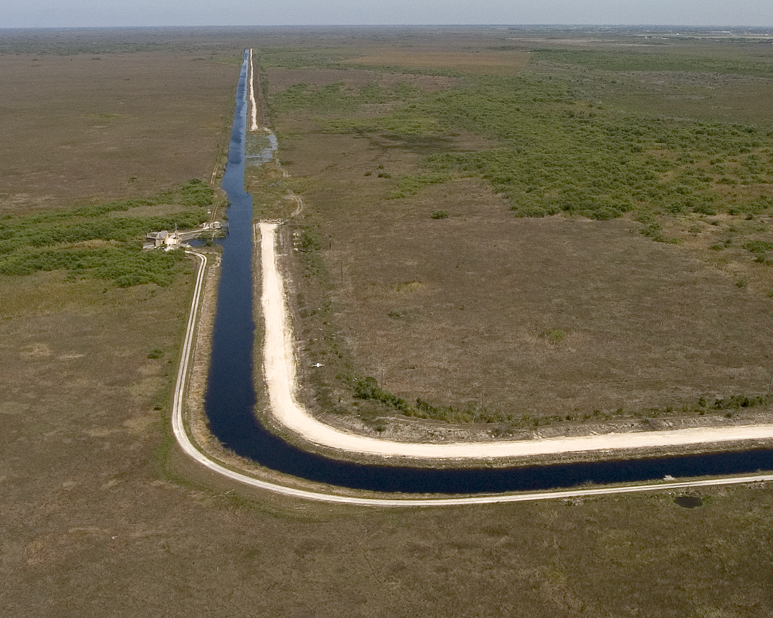 Everglades Restoration